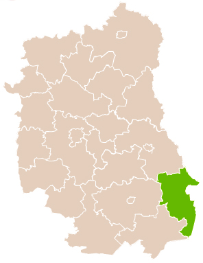 Map of Hrubieszów county, Lublin voivodship Mapa powiatu hrubieszowskiego, województwo lubelskie